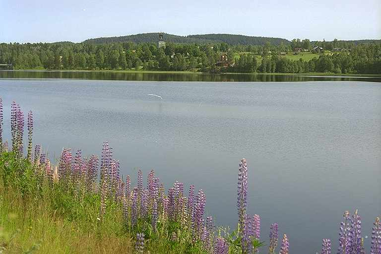 Runsten, den så kallade "Skramlestenen", finns i omgivningarna. Motiv: Gunnarskog Kategori: Insjömiljöer Runsten, den så kallade "Skramlestenen", finns i omgivningarna.